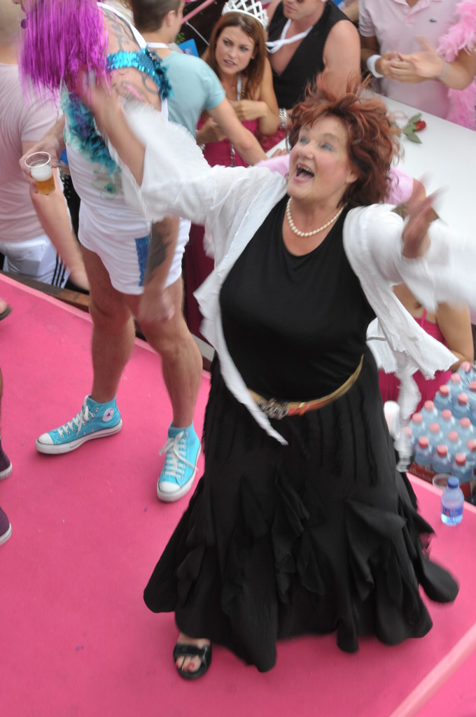 Imca Marina tijdens de Gay Pride 2008 in Amsterdam